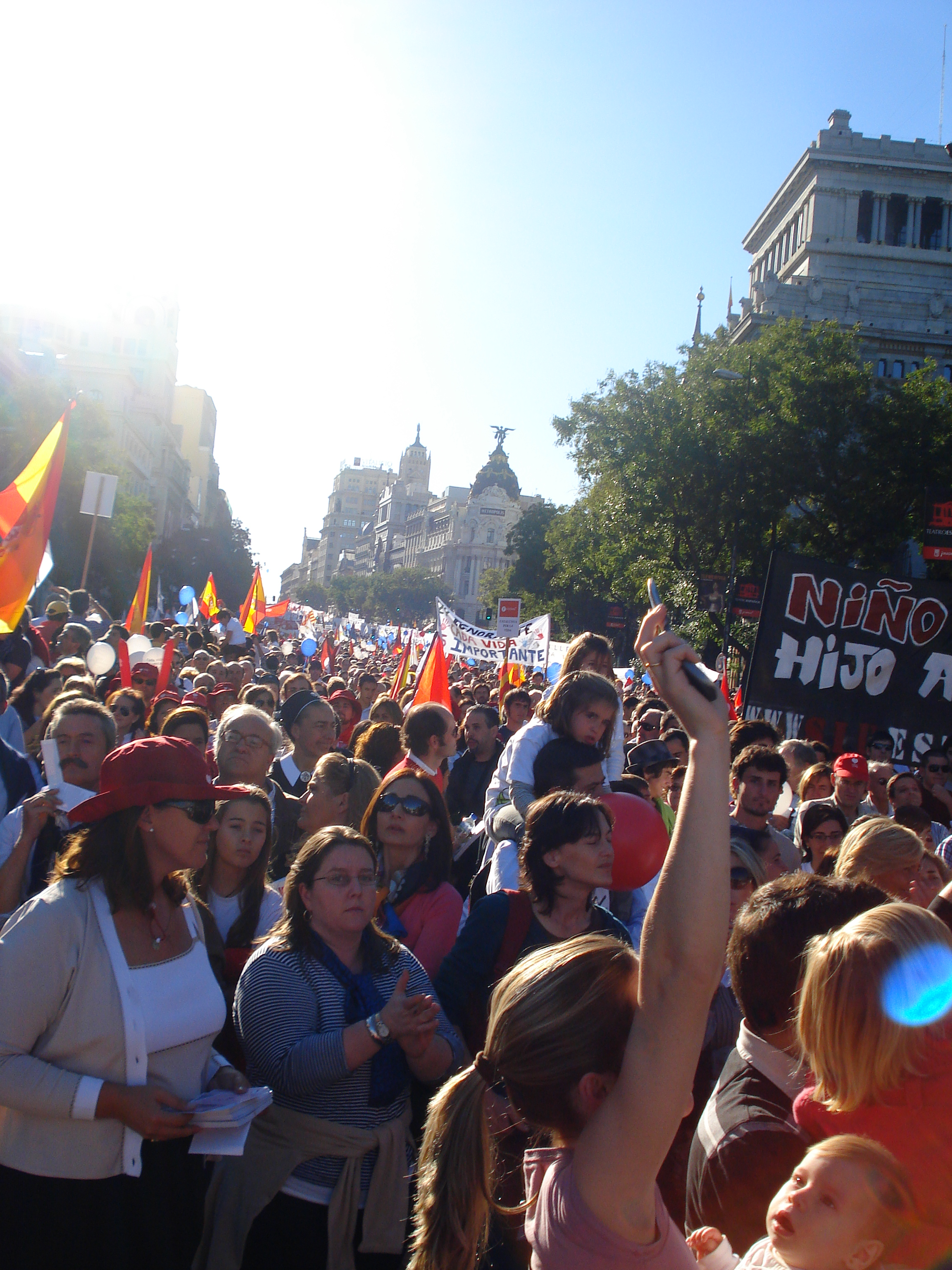 Aunque esta foto está contraluz se puede uno hacer a la idea de la gente que había.